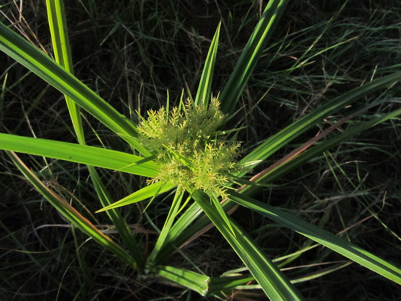 Found in Oscar Scherer State Park, Florida